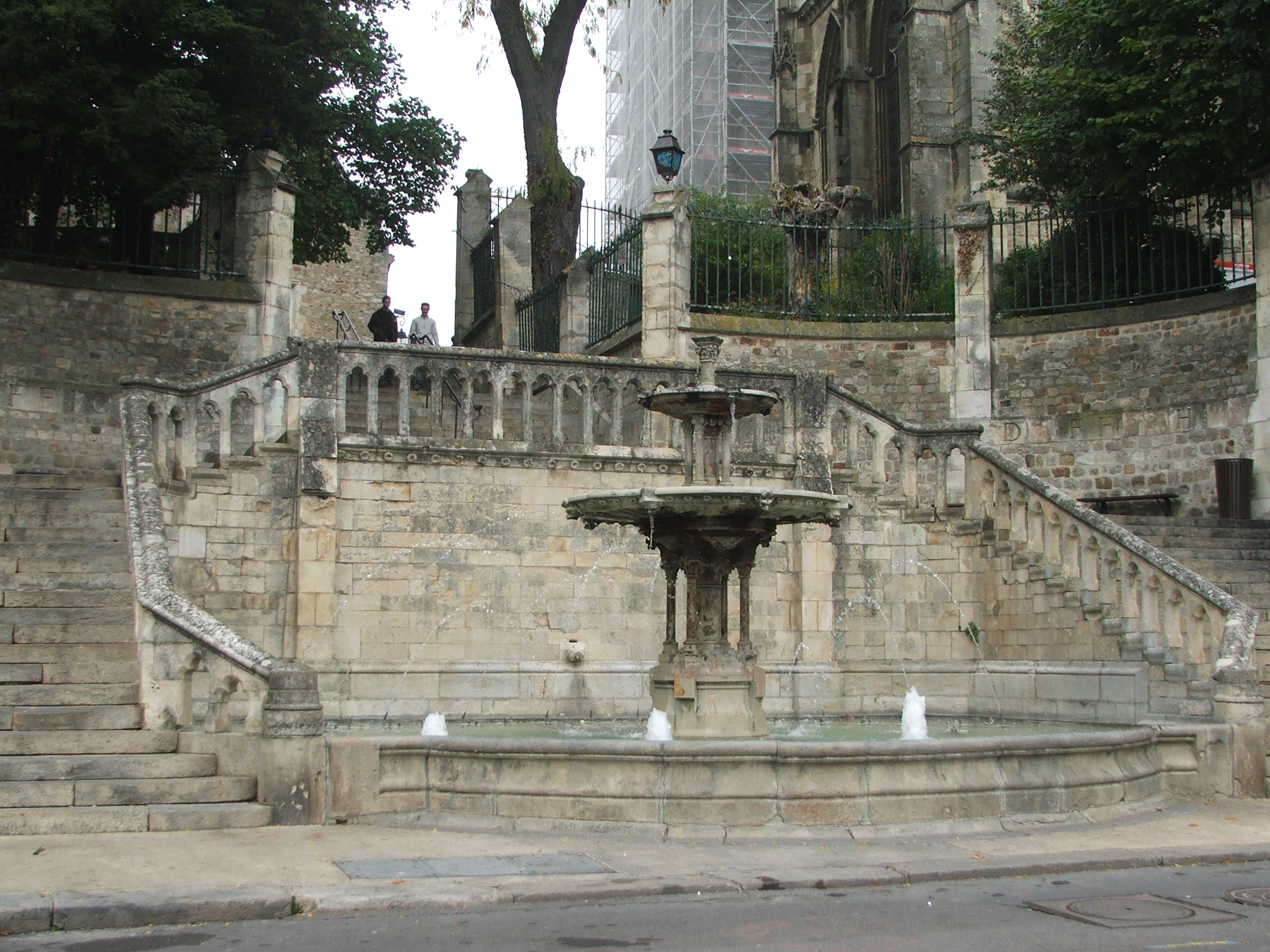 Photographie de la place du Jet d'eau au Mans, au nord de la place des Jacobins, en plein automne.